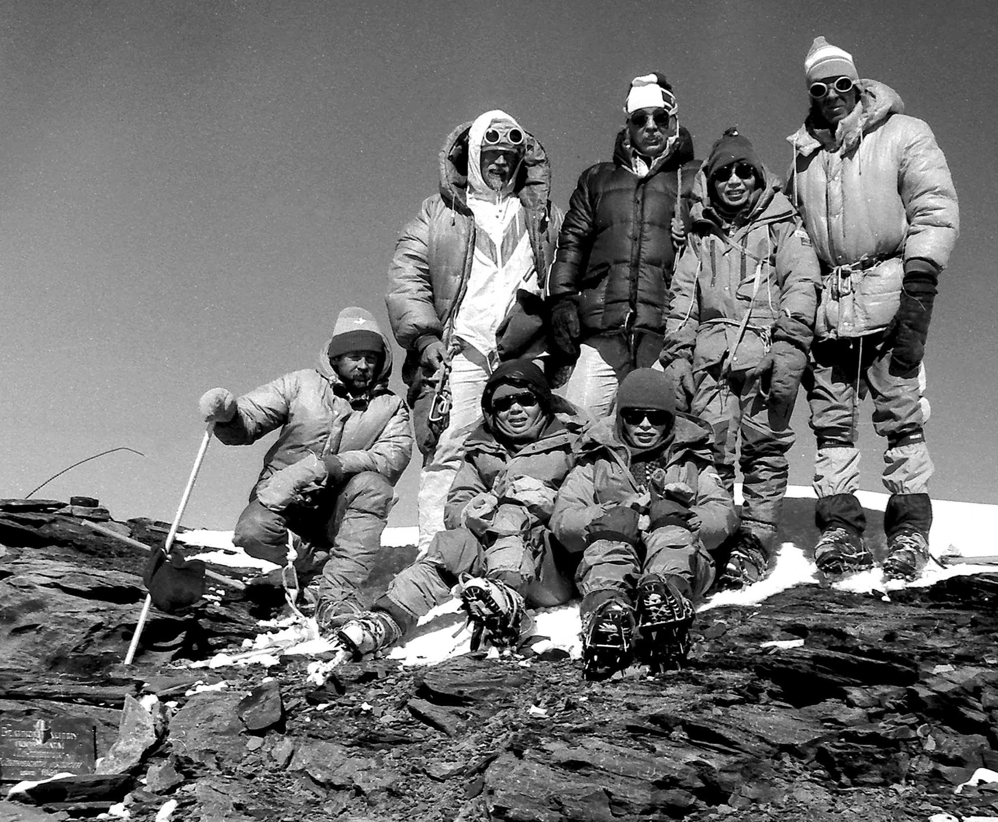 Junko Kommunismil 85